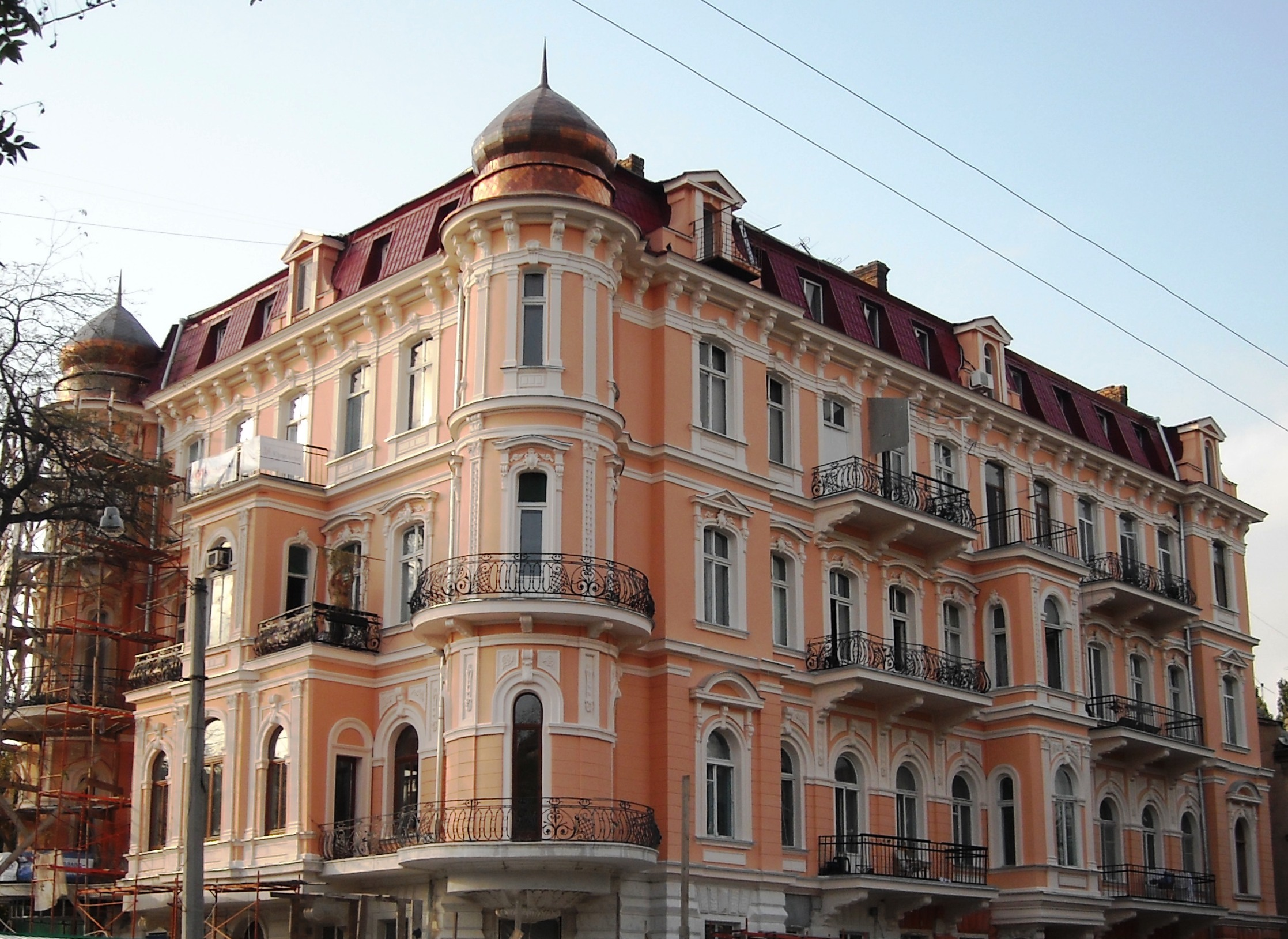 1901, Д.І.Мазіров. Будинок житловий,у якому жили:- Л.В. Мацієвська - українська актриса, н.а. УРСР;- Г. Бабенко - український актор, н.а. УРСР;- Є.І. Дублянська - піаністка, диригент, професор;- С. Збандутто - педагог, професор- Ф.І. Страутман - зоолог, професор;- Б. Борін - н.а.УРСР, головний режисер Одеського українського драмтеатра